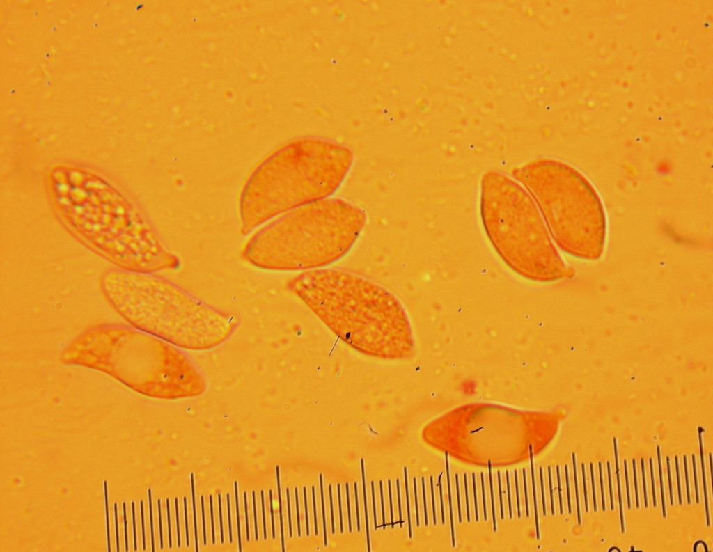 Tremellodendropsis tuberosa (Grev.) D.A. Crawford